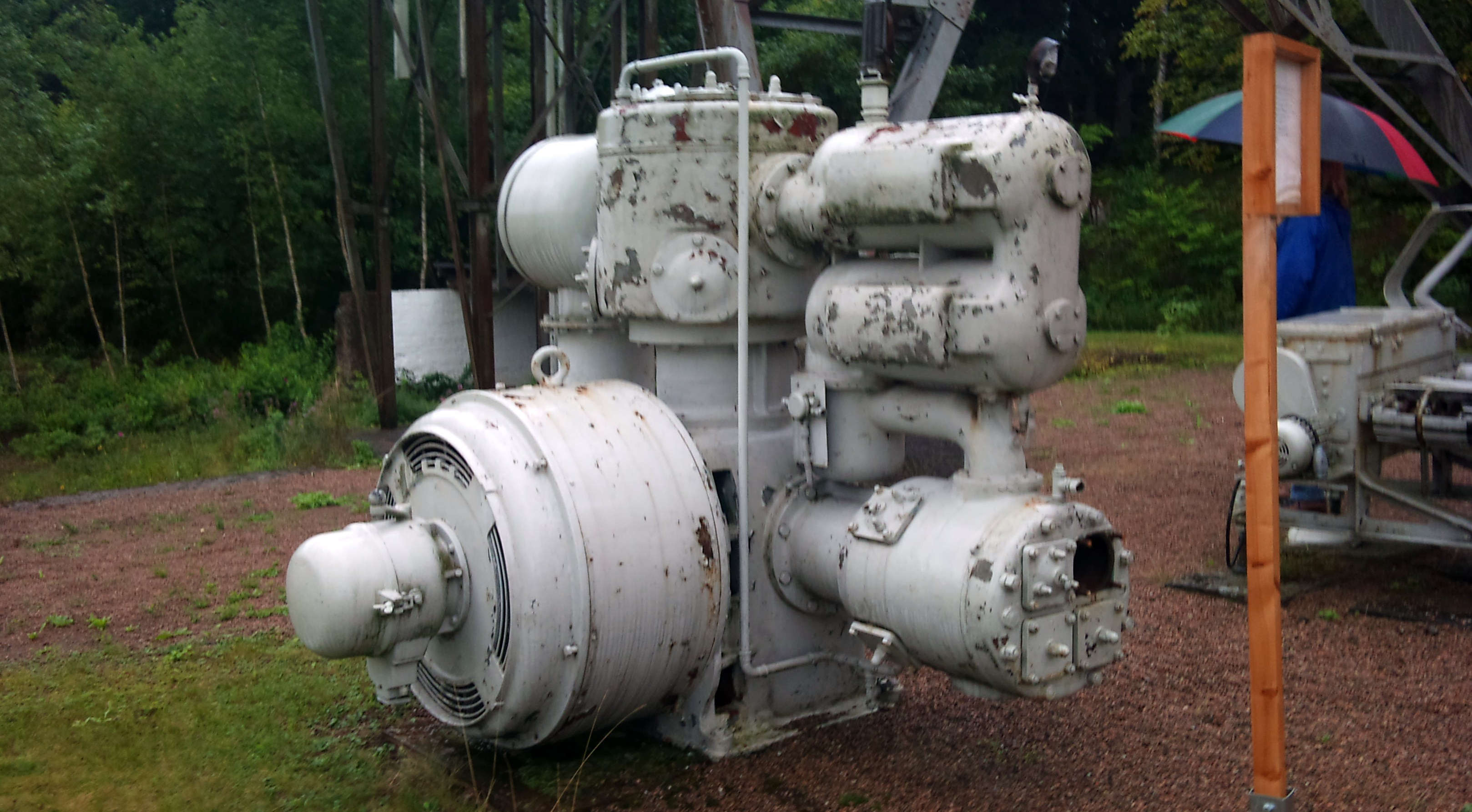 Kompressor